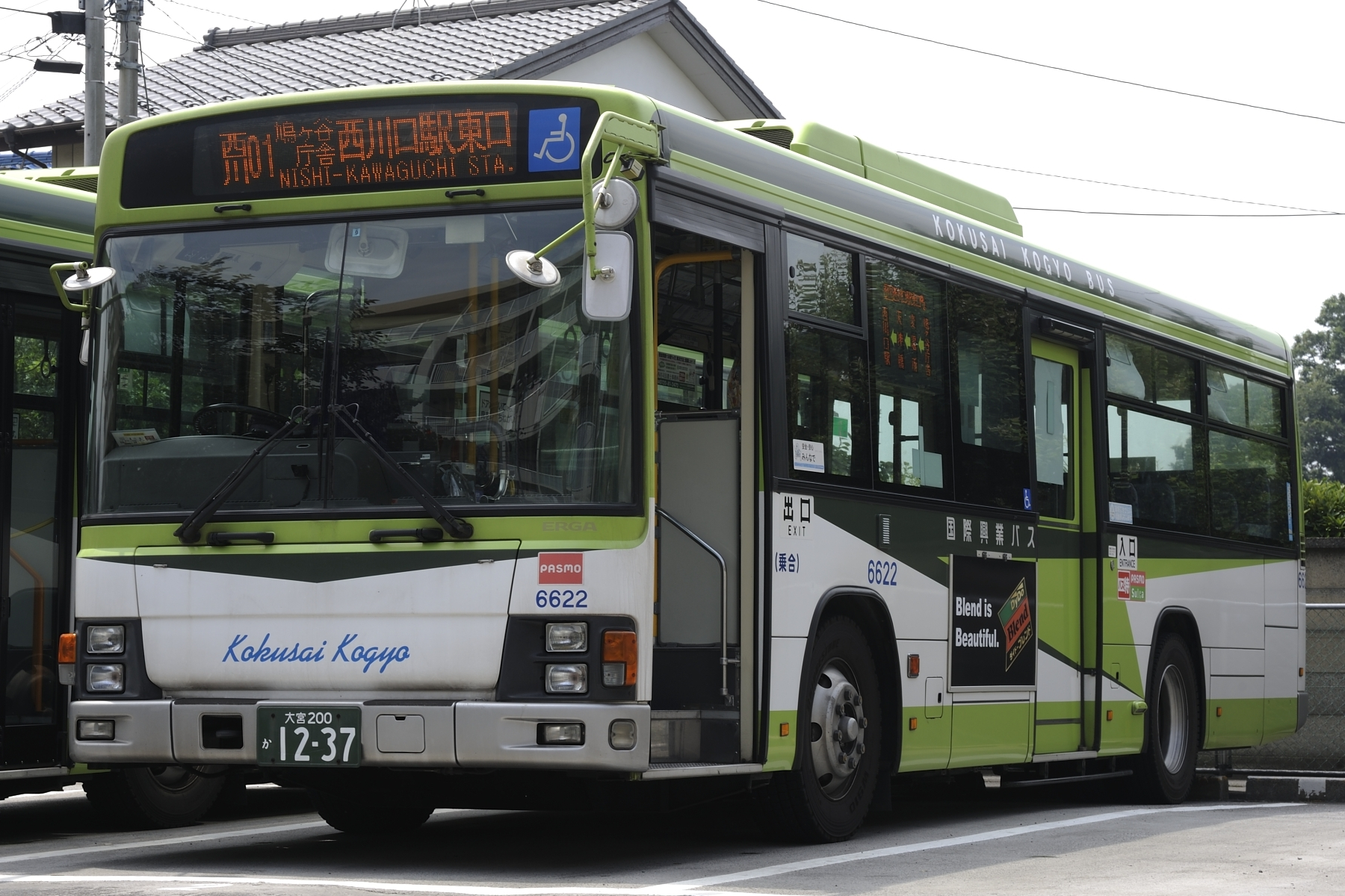 国際興業バス鳩ヶ谷営業所6622号車、西川01運用